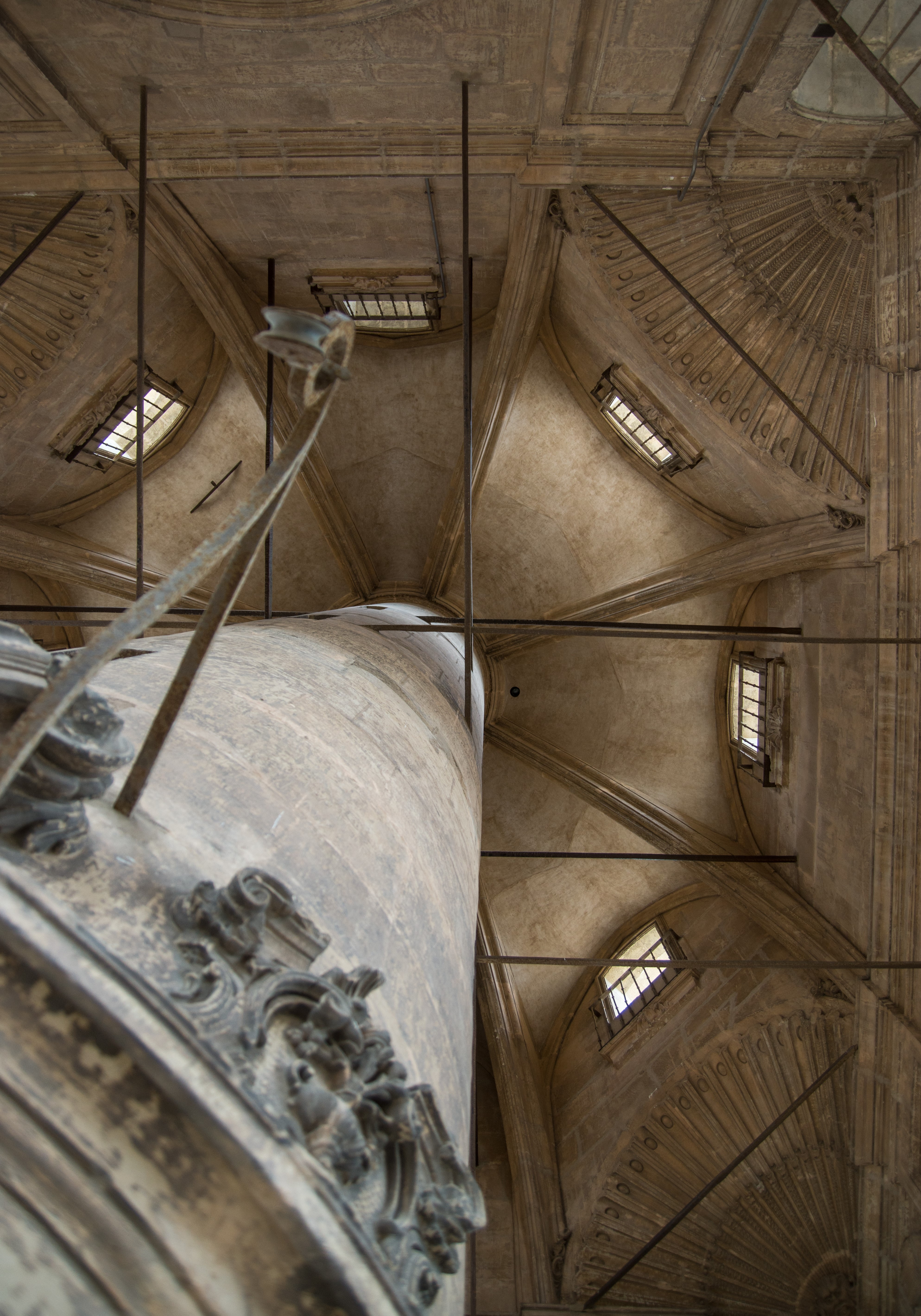 Iglesia Catedral de Santa María (Murcia) Interior de la Torre